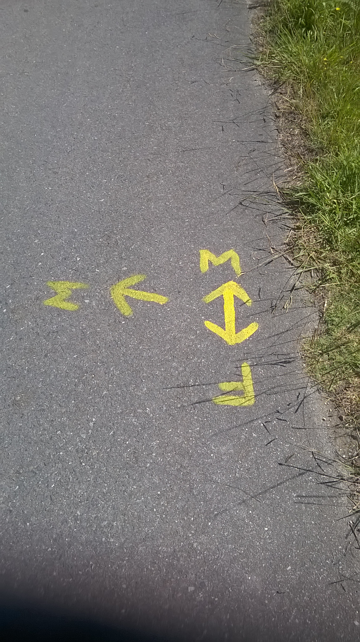 Sinal indicador, que dá lugar a confusión, no Camiño de Santiago entre Fisterra e Muxía, á altura de Suarriba, lugar da parroquia de Sardiñeiro (Fisterra)